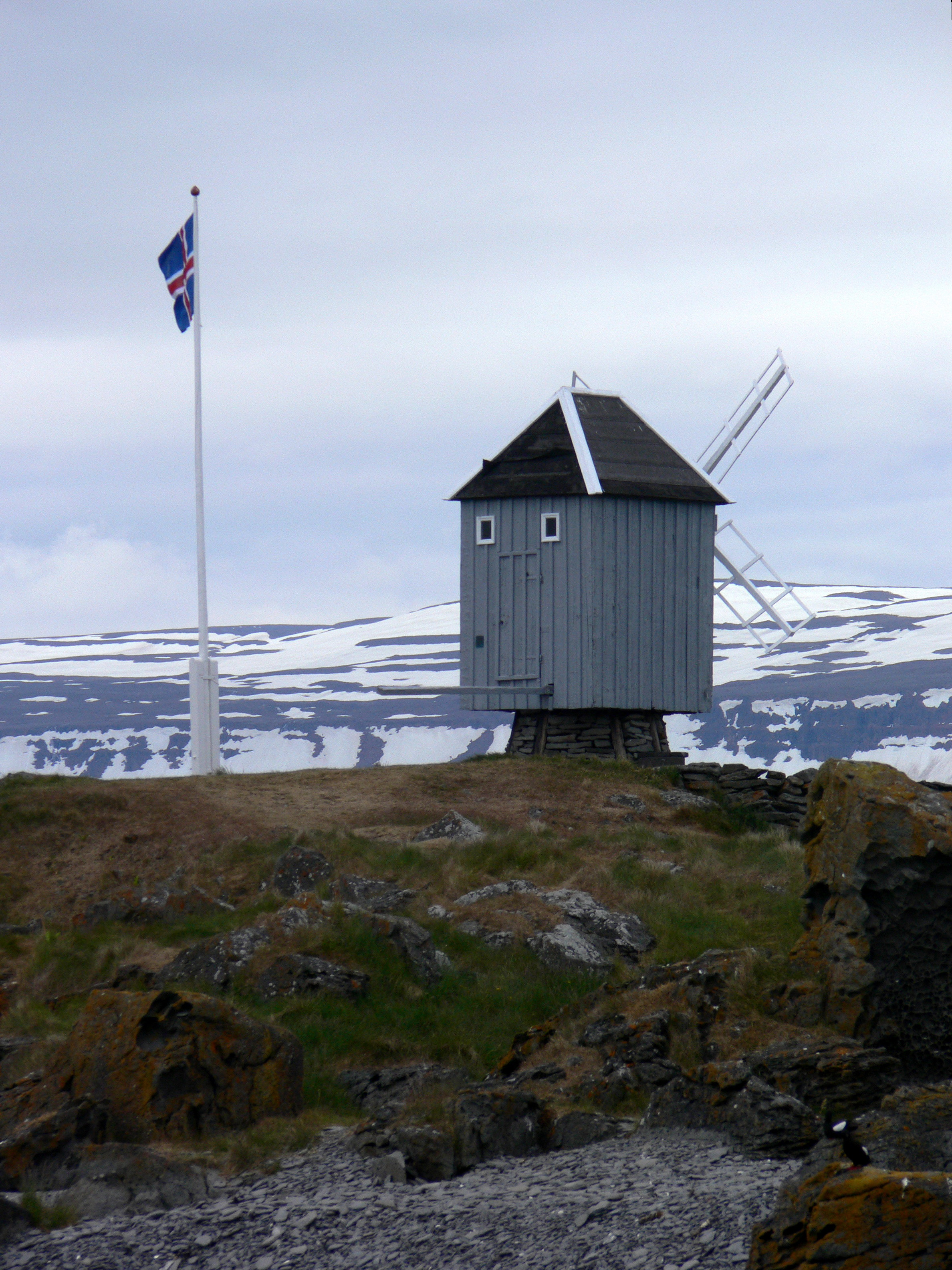 Die einzig noch bestehende Windmühle in Island auf der Insel Vigur im Ísafjarðardjúp.